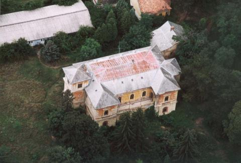 Balatonedericsi Fekete-kastélyEsperanto: Kastelo de Balatonederics.